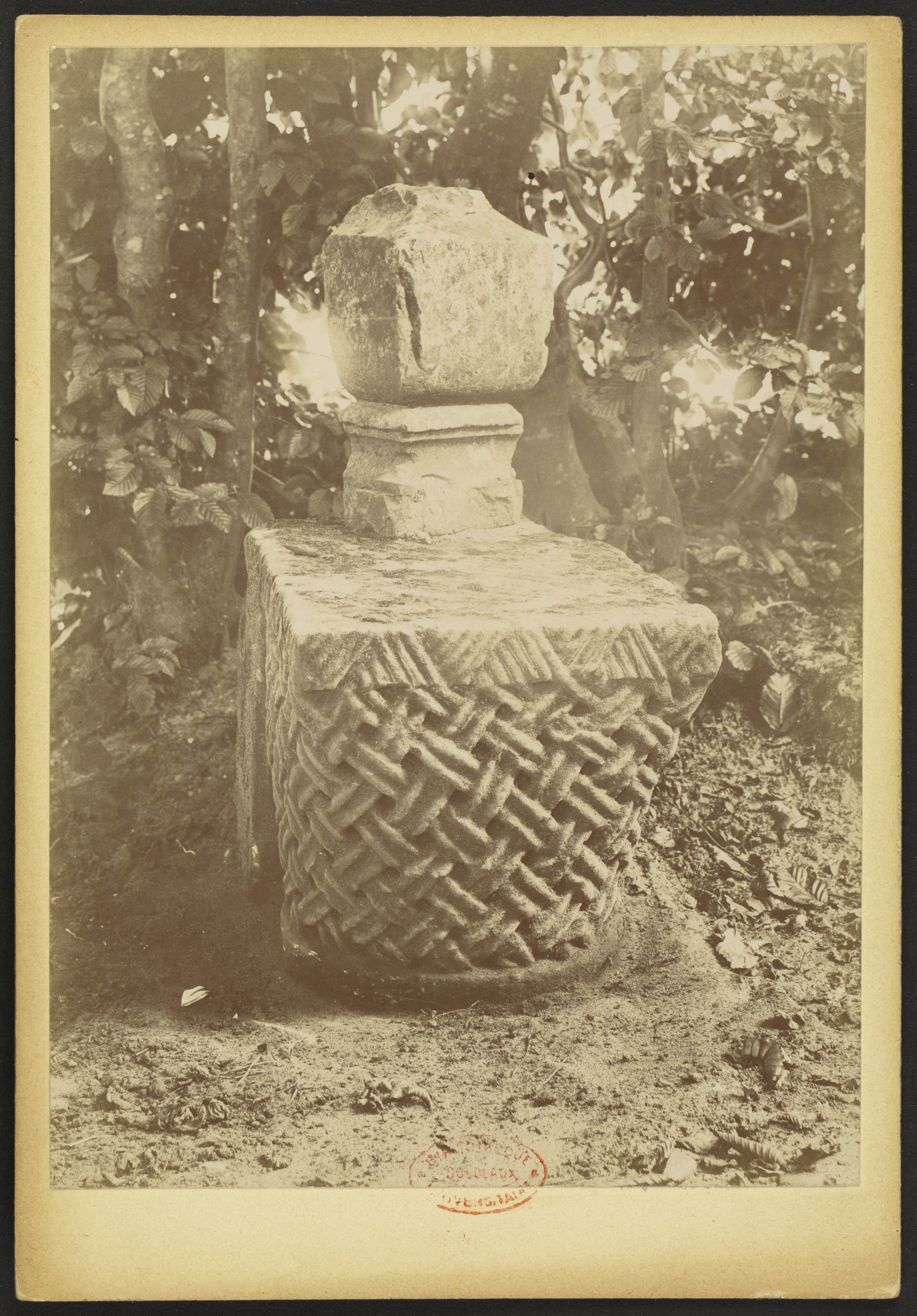 Eglise Saint-Martin de Bommes; Chapiteau